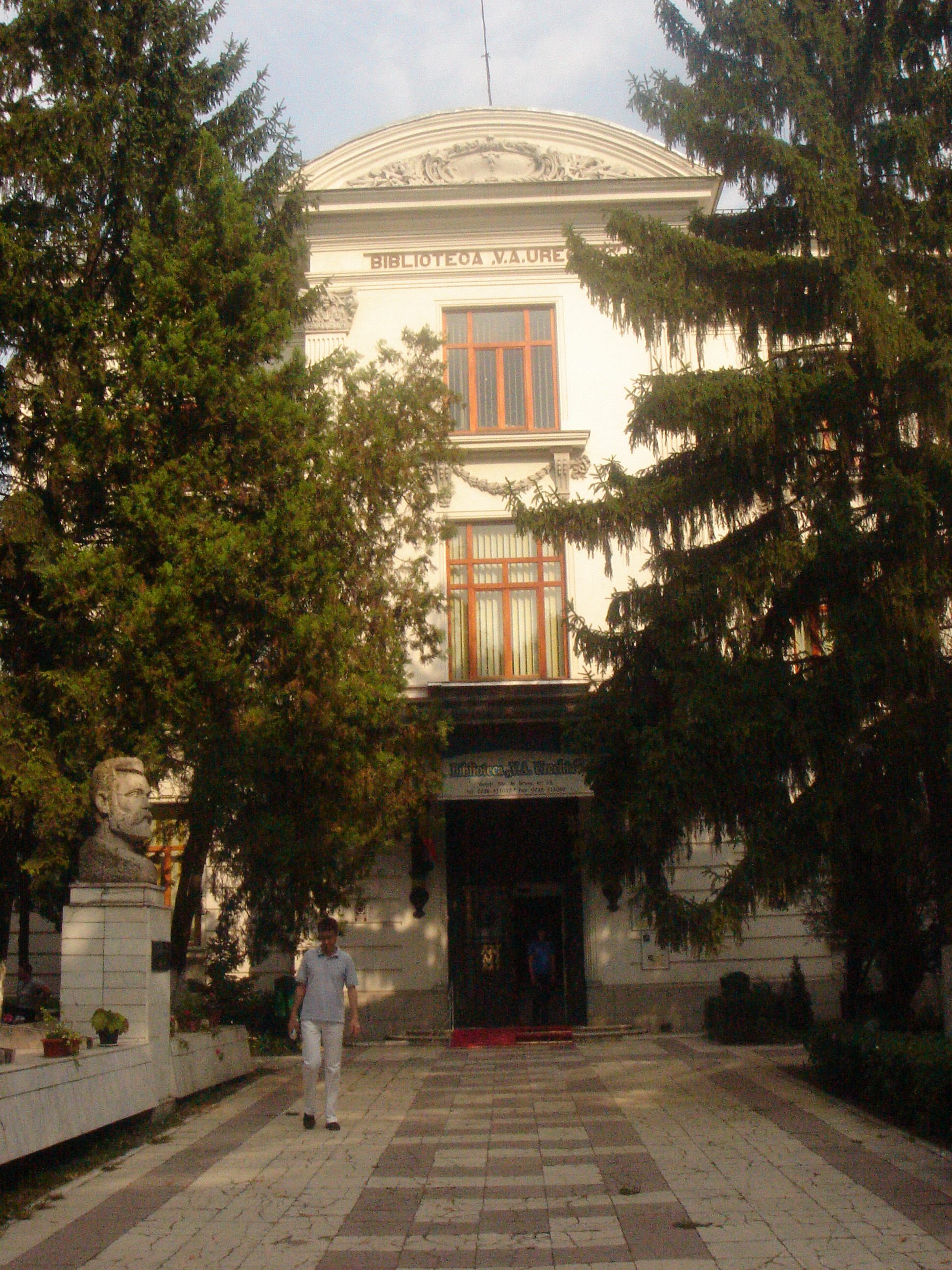 Palatul Comisiei Europene a Dunării, azi Biblioteca "V.A.Urechia", cunoscuta ca Biblioteca Urechia, se afla pe Strada Mihai Bravu relativ in spatele Bisericii Romano-Catolice, langa interectia Garii cu Mihai Bravu.